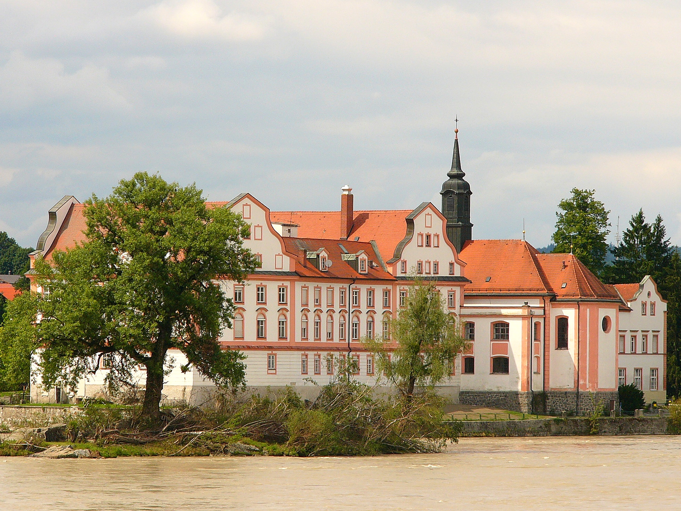 Schloss Neuhaus; jetzt Kloster, Vierflügelbau nach Plan Johann Michael Fischers auf Inninsel errichtet, 1750/52, Teile im Kern älter; nördlich sog. Tochterbau, kleine Vierflügelanlage im Stil des Hauptbaues, um 1889; Marmorstandbild des hl. Johannes v. Nepomuk, überlebensgroß, vor der Schlossbrücke, bez. 1739. This is a photograph of an architectural monument.